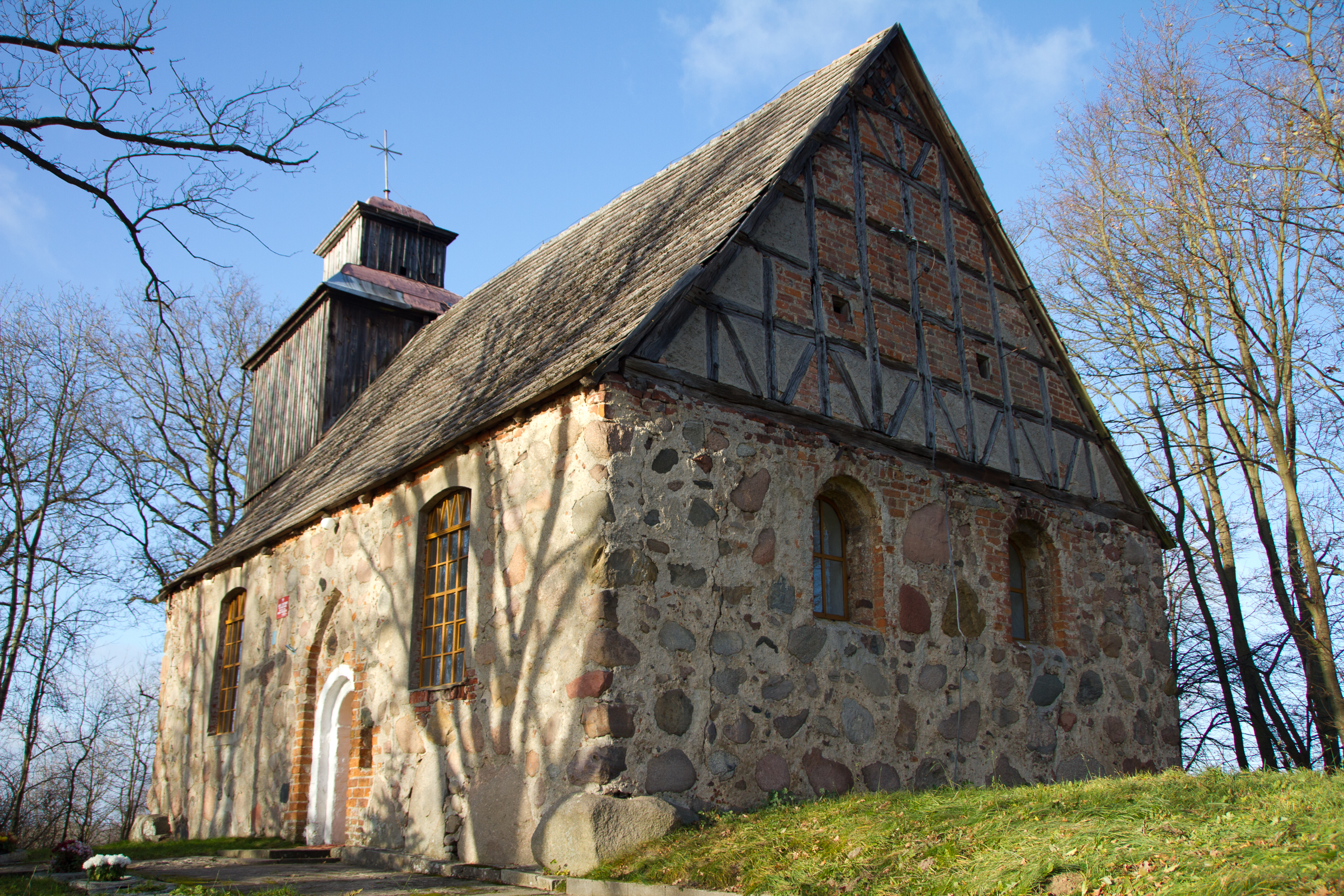 Chwarstno, kościół fil. p.w. Wniebowzięcia NMP, XVI